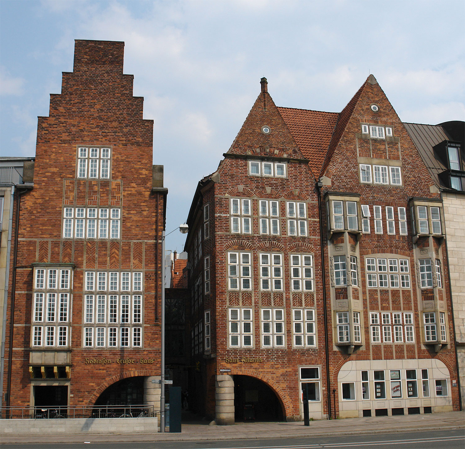 Böttcherstraße Bremen: Robinson-Crusoe-Haus und Haus Atlantis (Front zur Martinistraße) Das Robinson-Crusoe-Haus (links) ist ein geschütztes Kulturdenkmal in der Freien Hansestadt Bremen, mit der Nr. 1497,T beim Landesamt für Denkmalpflege registriert.